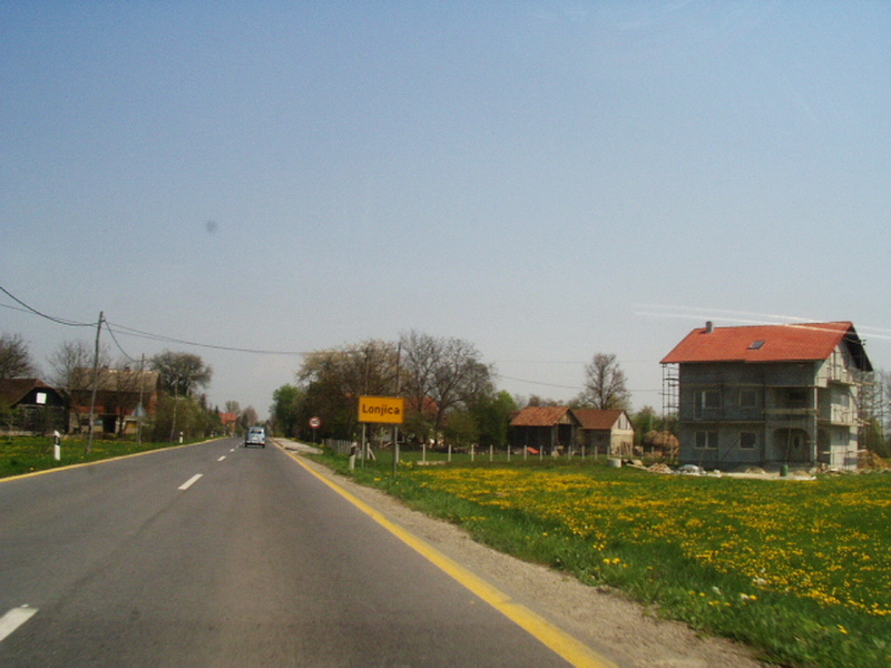 Lonjica - Entrance